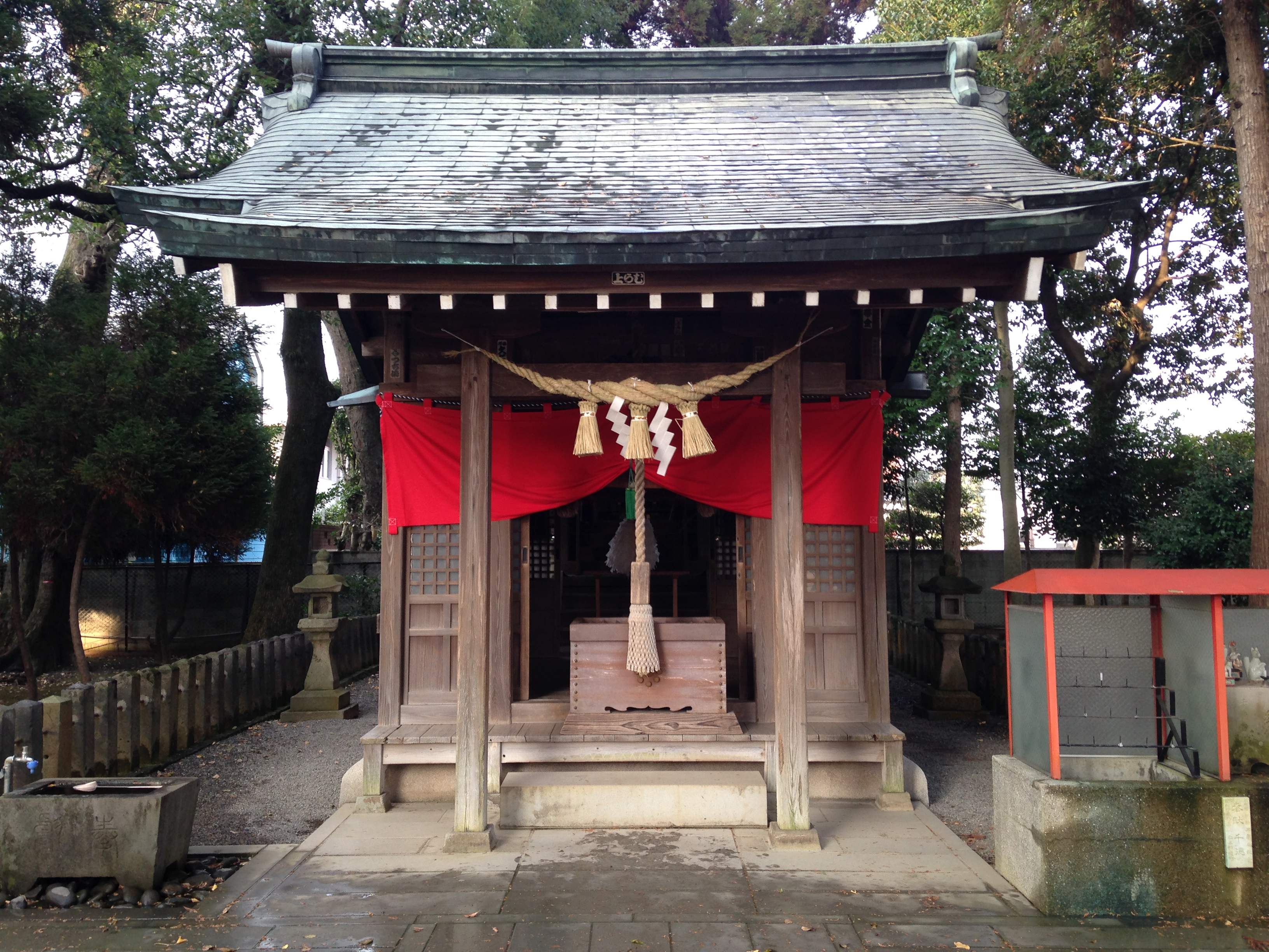 水前寺成趣園・稲荷神社の拝殿